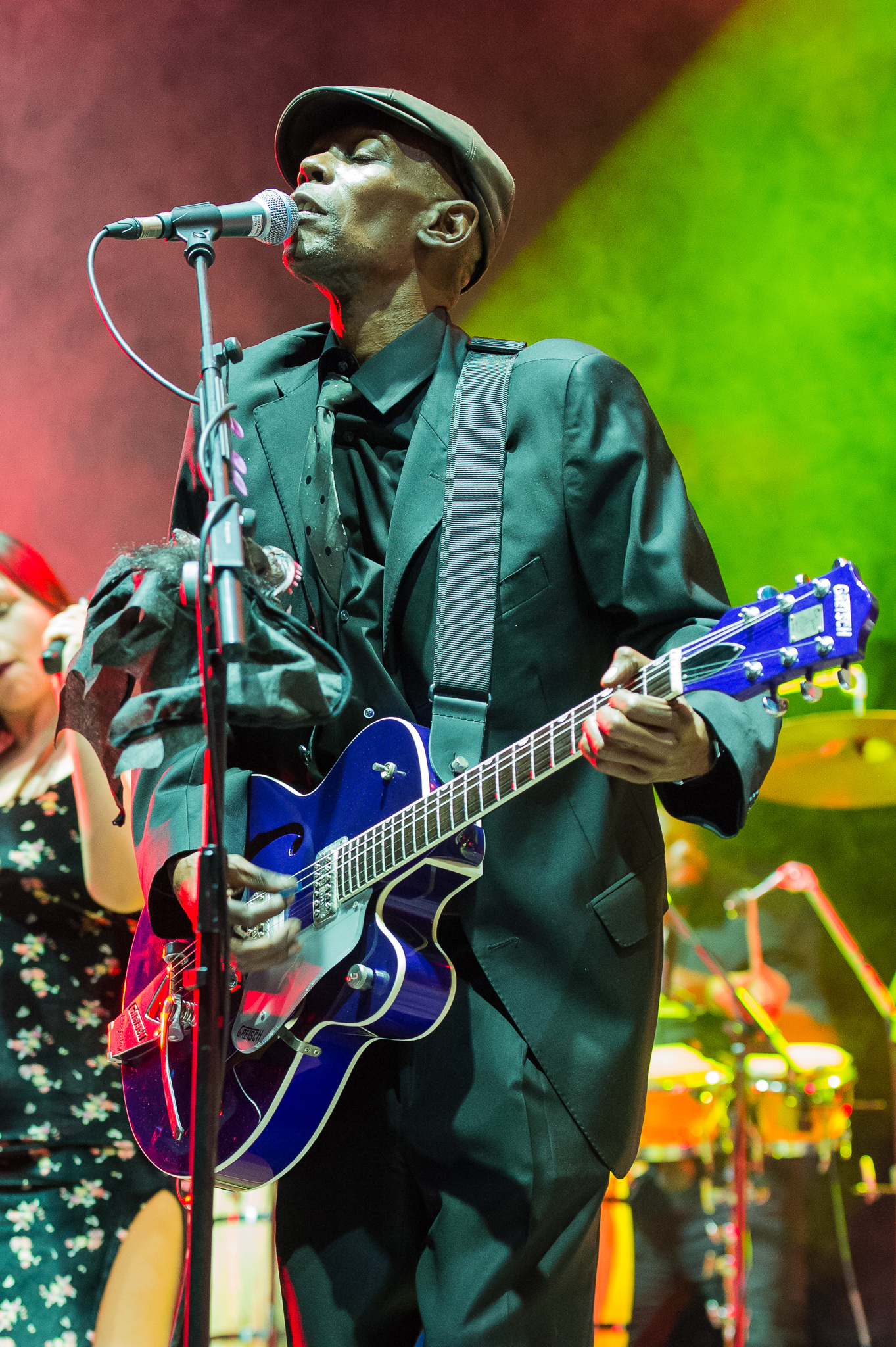 ARGO-Konzerte,Alternarena,Arena Nürnberger Versicherungen,Festival,Konzert,Livekonzert,Livemusik,Maxi Jazz,Maxi Jazz & the E-Type Boys,Maxwell Alexander Fraser,Musik,RiP,Rock im Park 2015